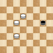 Основной крюк треугольника Петрова